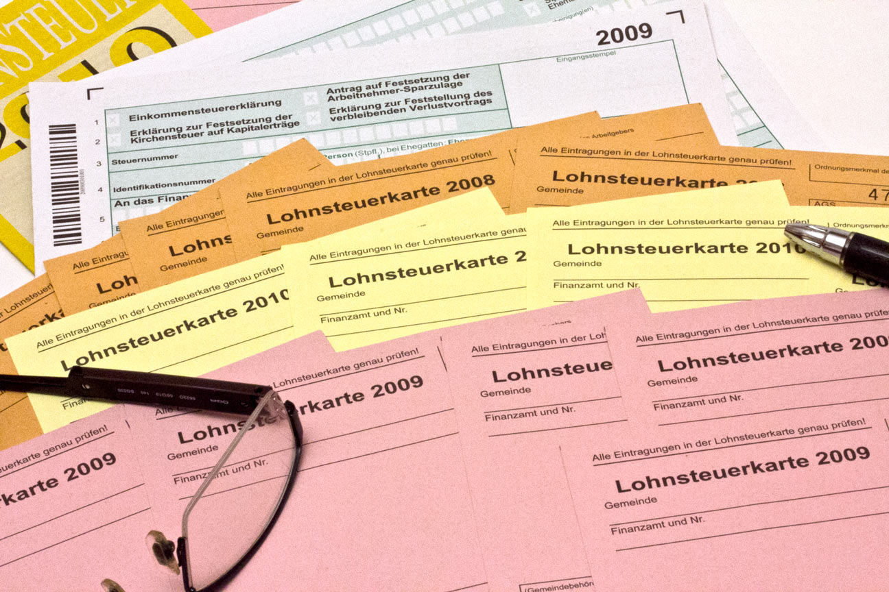 Die Lohnsteuerkarte hat ausgedient. Für 2011 werden keine neuen Lohnsteuerkarten ausgestellt.